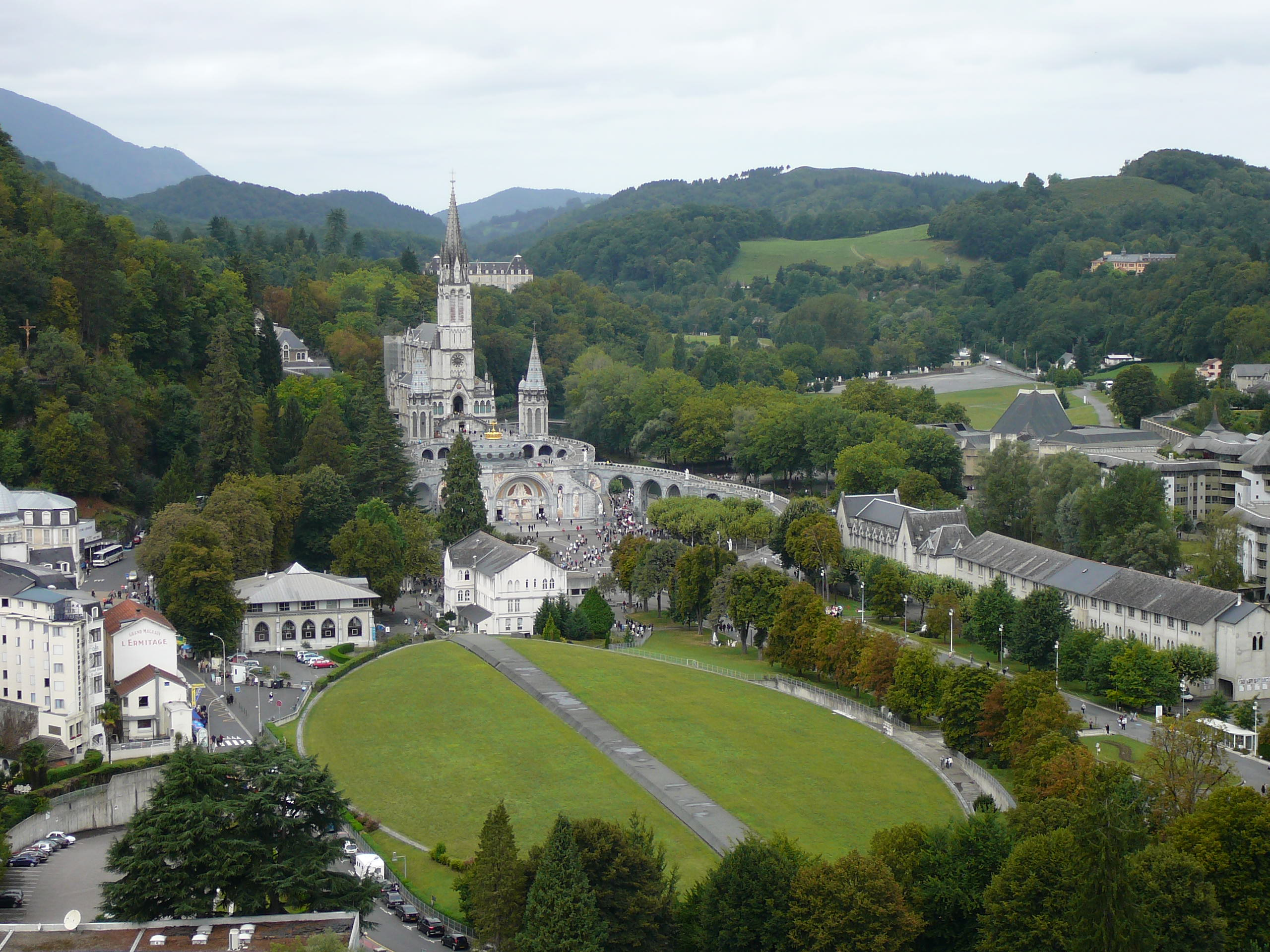 Lourdes - Santuario visto dal forte